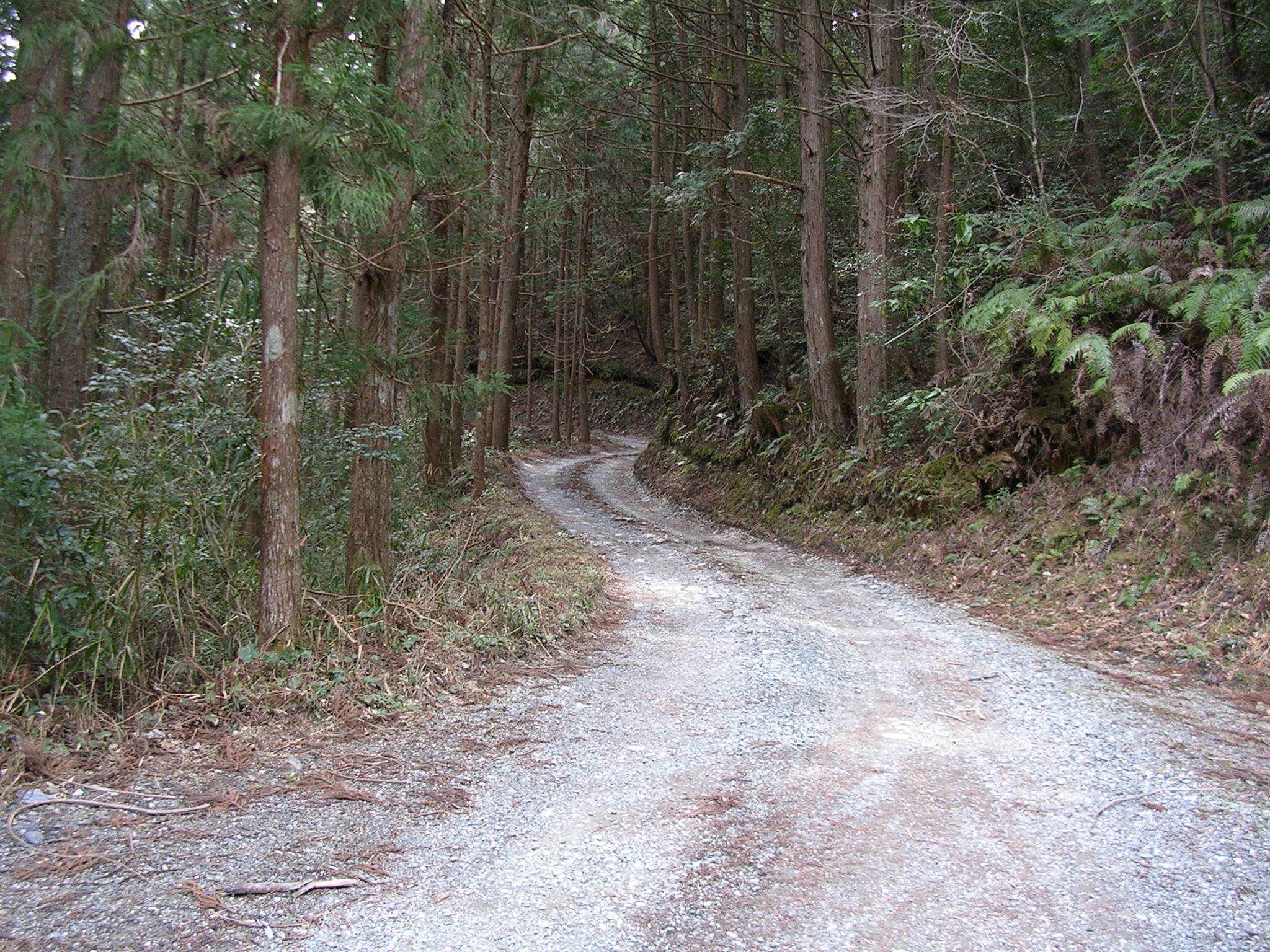 城跡推定地である花瀬山